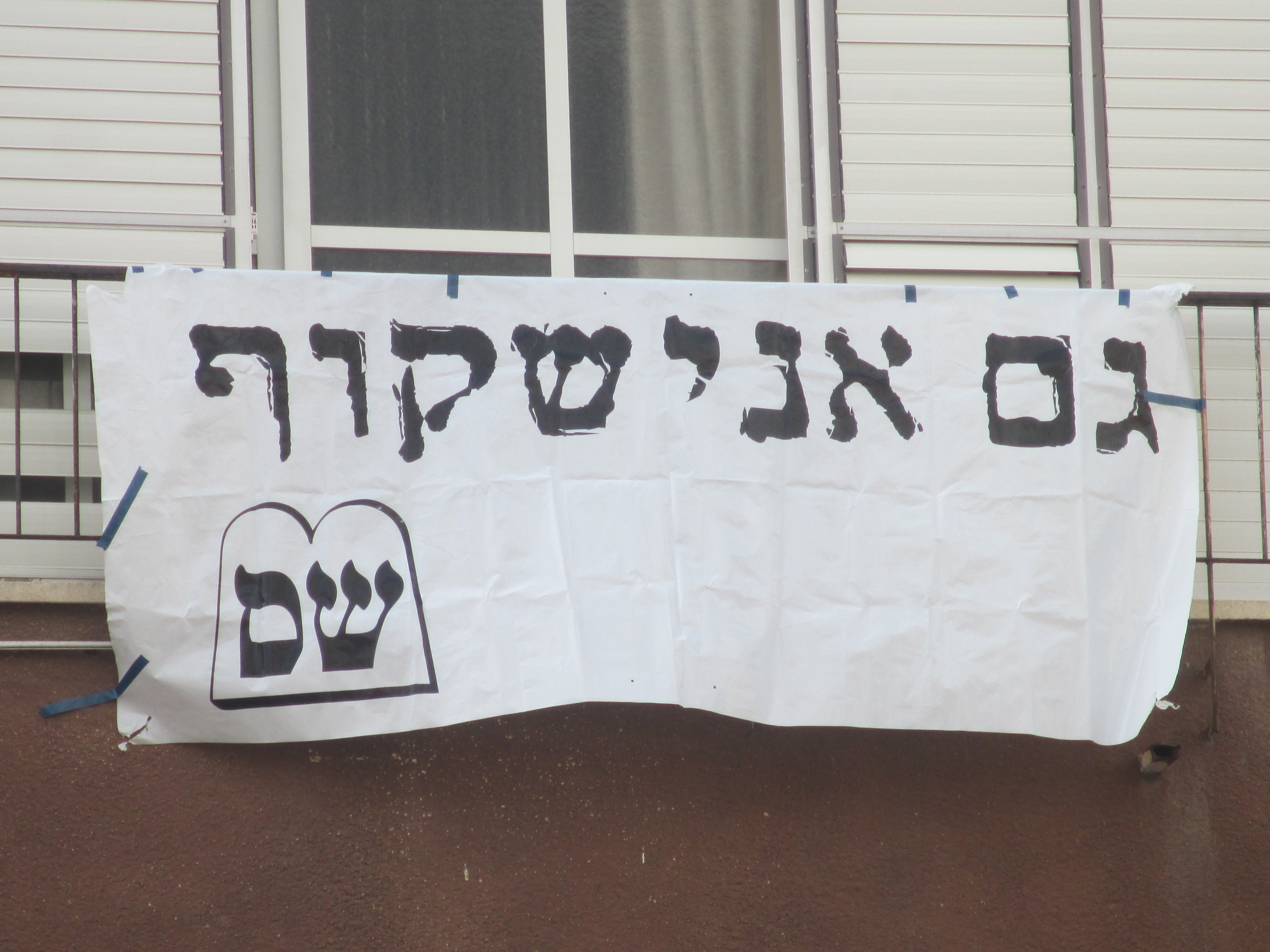 כרזת בחירות של ש"ס, בחירות 2015